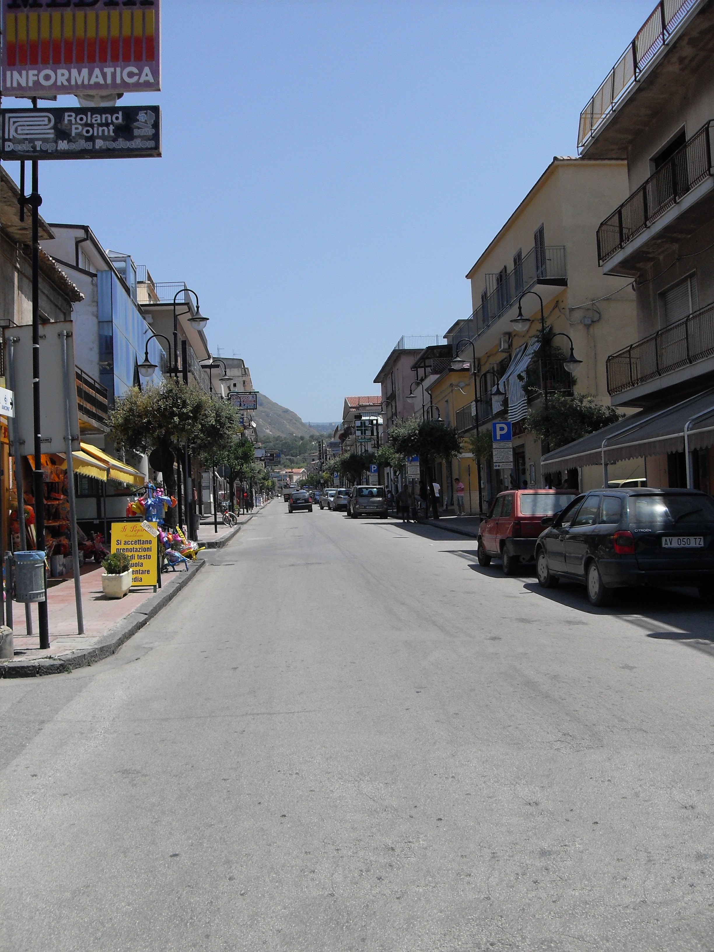 Io sottoscritto Luigi Salvatore Vadacchino, utente di Wikipedia sotto il nome di Lodewijk Vadacchino, cedo l'immagine SDC11098.JPG a Wikimedia Italia, sotto licenza CC-BY-SA, con il nome Campora_San_Giovanni_2009_-_Corso_Italia.jpg. L'Immagine fotografica raffigura la mia cittadina natale di Campora San Giovanni, ovvero il Corso Italia. Porgo come sempre i miei distintissimi saluti, con l'augurio che possiate venirmi a far visita. Vostro come sempre--13:47, 17 lug 2009 (CEST)